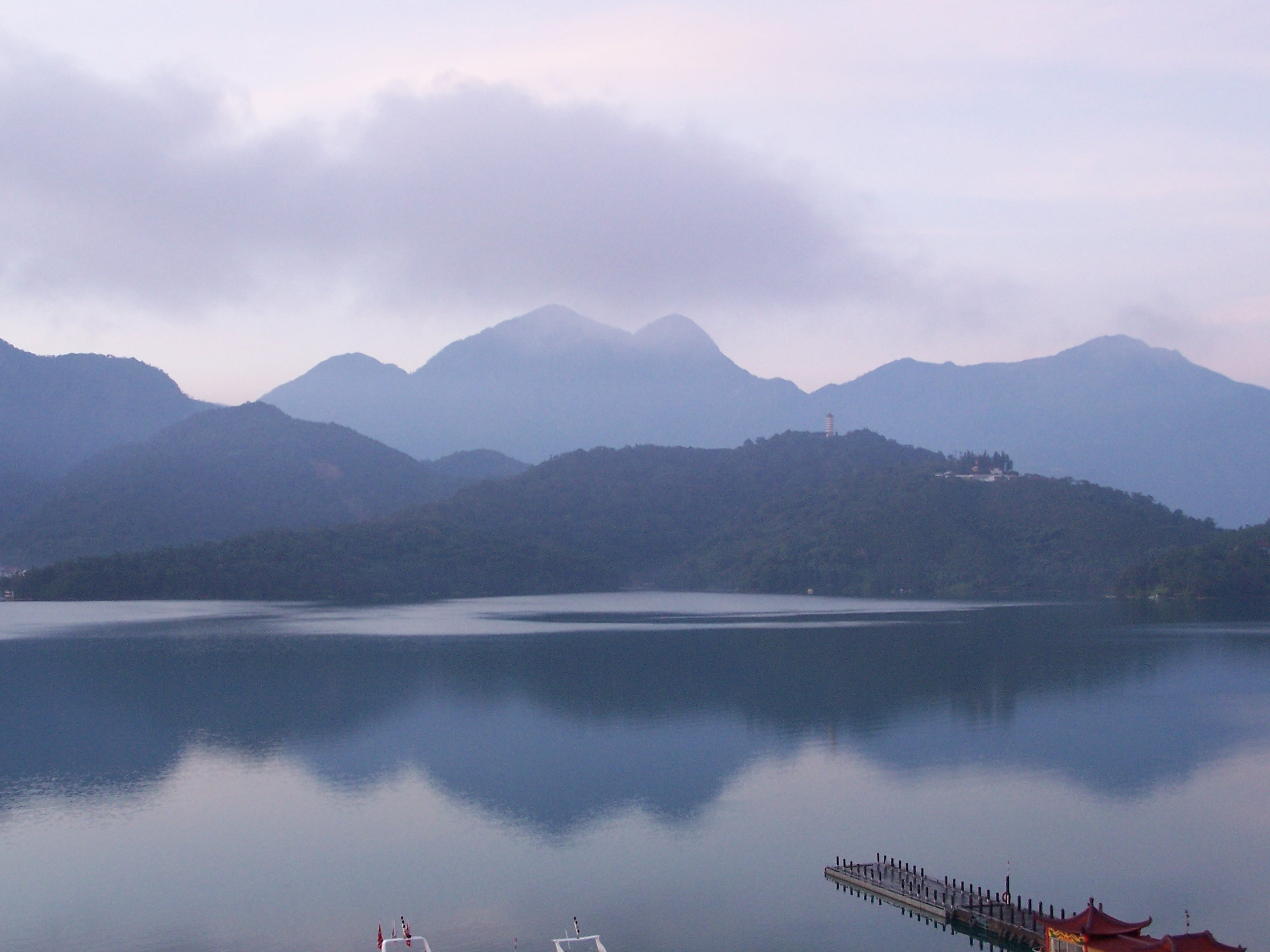 A view of Sun Moon Lake